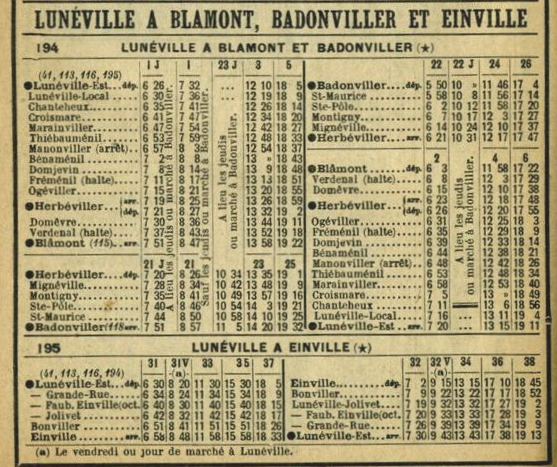 Fahrplan der Bahnstrecken Luneville-Einville und Luneville-Blamont-Badonviller. 1910er oder 1920er jahre.